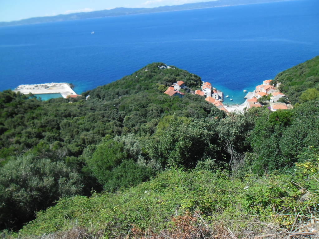 Lučica ispod mjesta Lastova